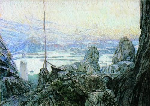 Фиорды. 1905 Эскиз декорации к драме Г. Ибсена "Дочь моря" Бумага на картоне, пастель. 54 x 76 см Государственный центральный театральный музей им. А.А.Бахрушина